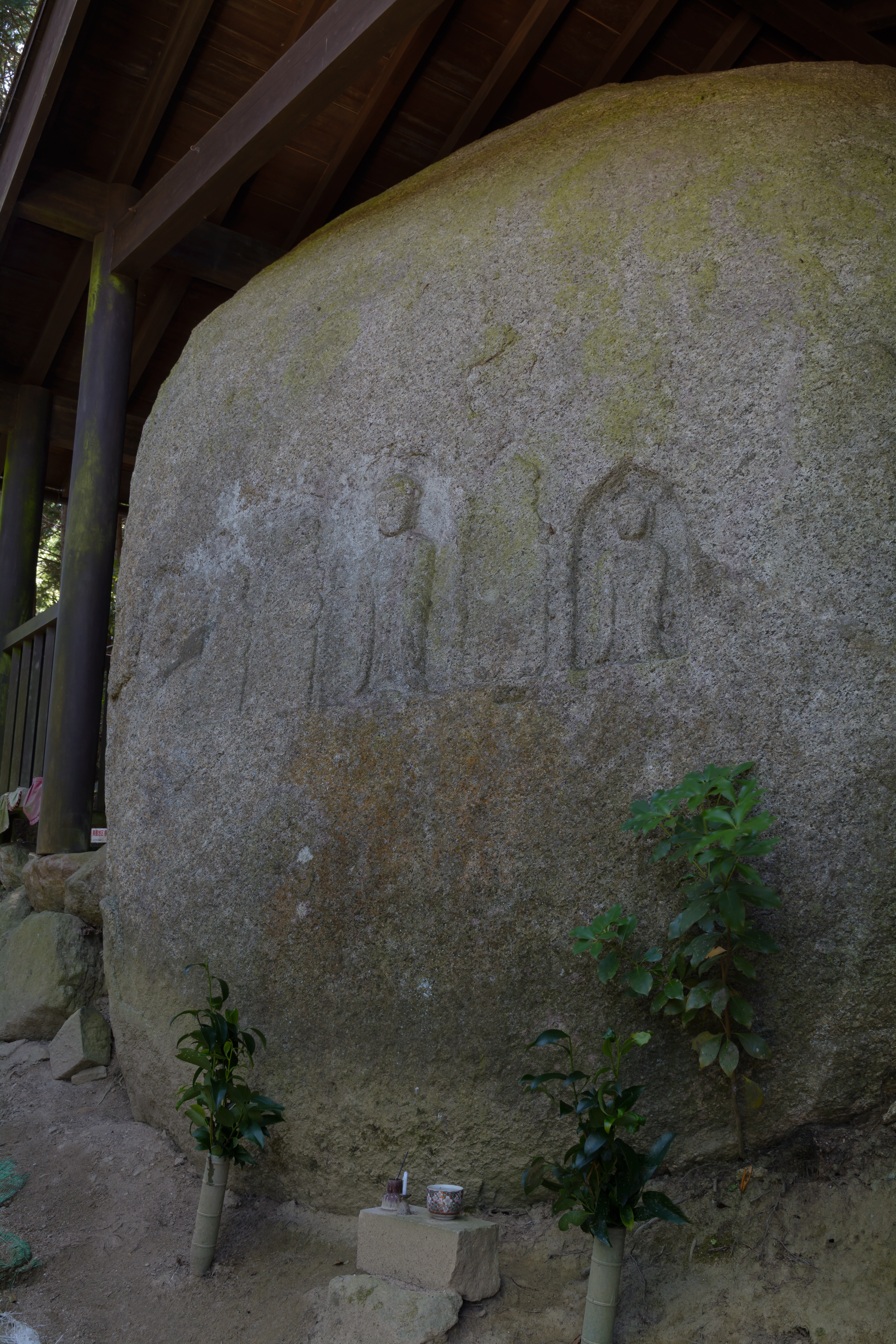 疱瘡地蔵（奈良市柳生町）側面、ここにも地蔵が刻まれている。正面右下部には徳政碑文が刻まれている。